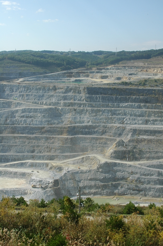 Hachinohe mine